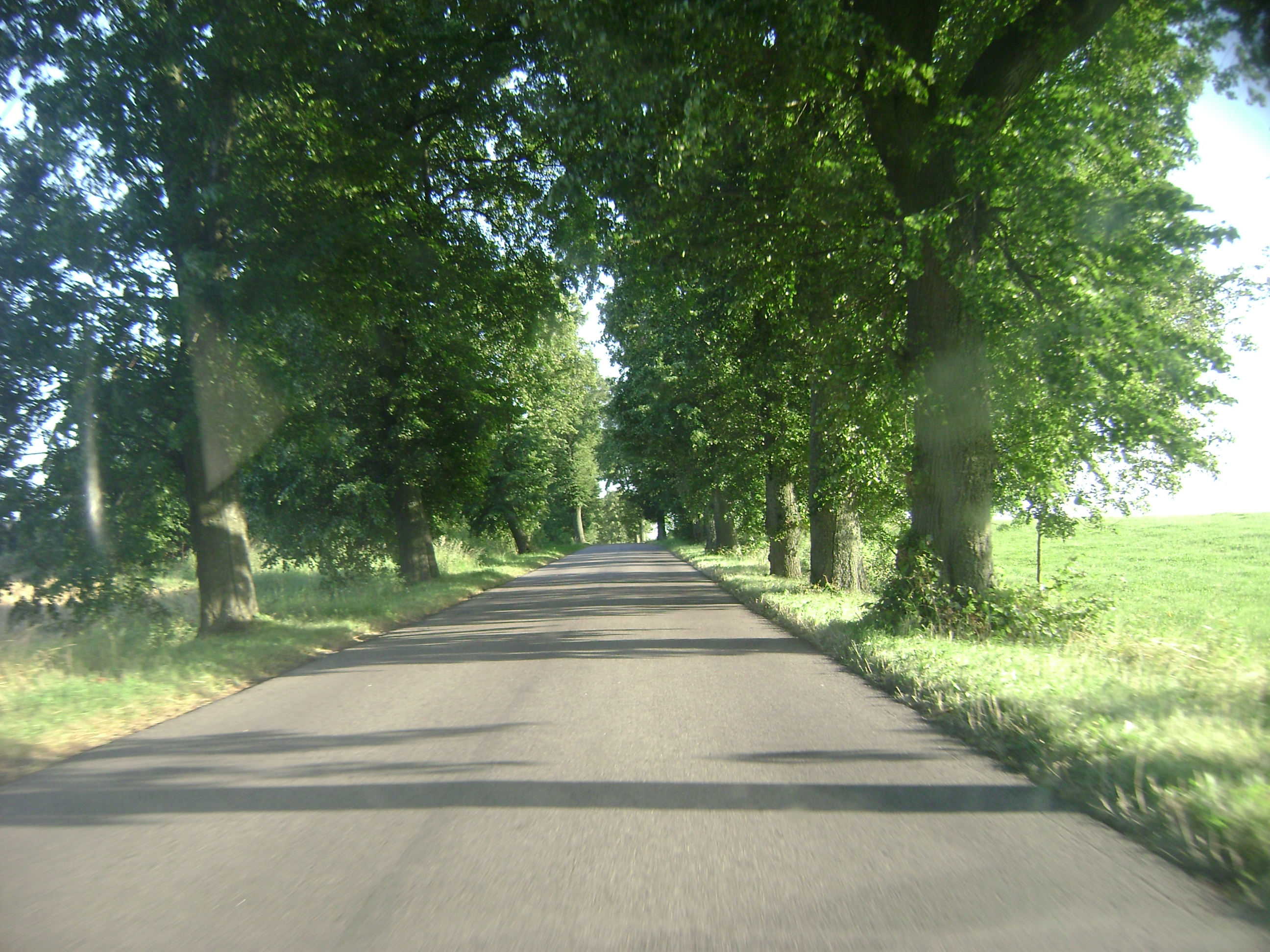 Droga wojewódzka nr 590 (DW590). Okolice Reszla.